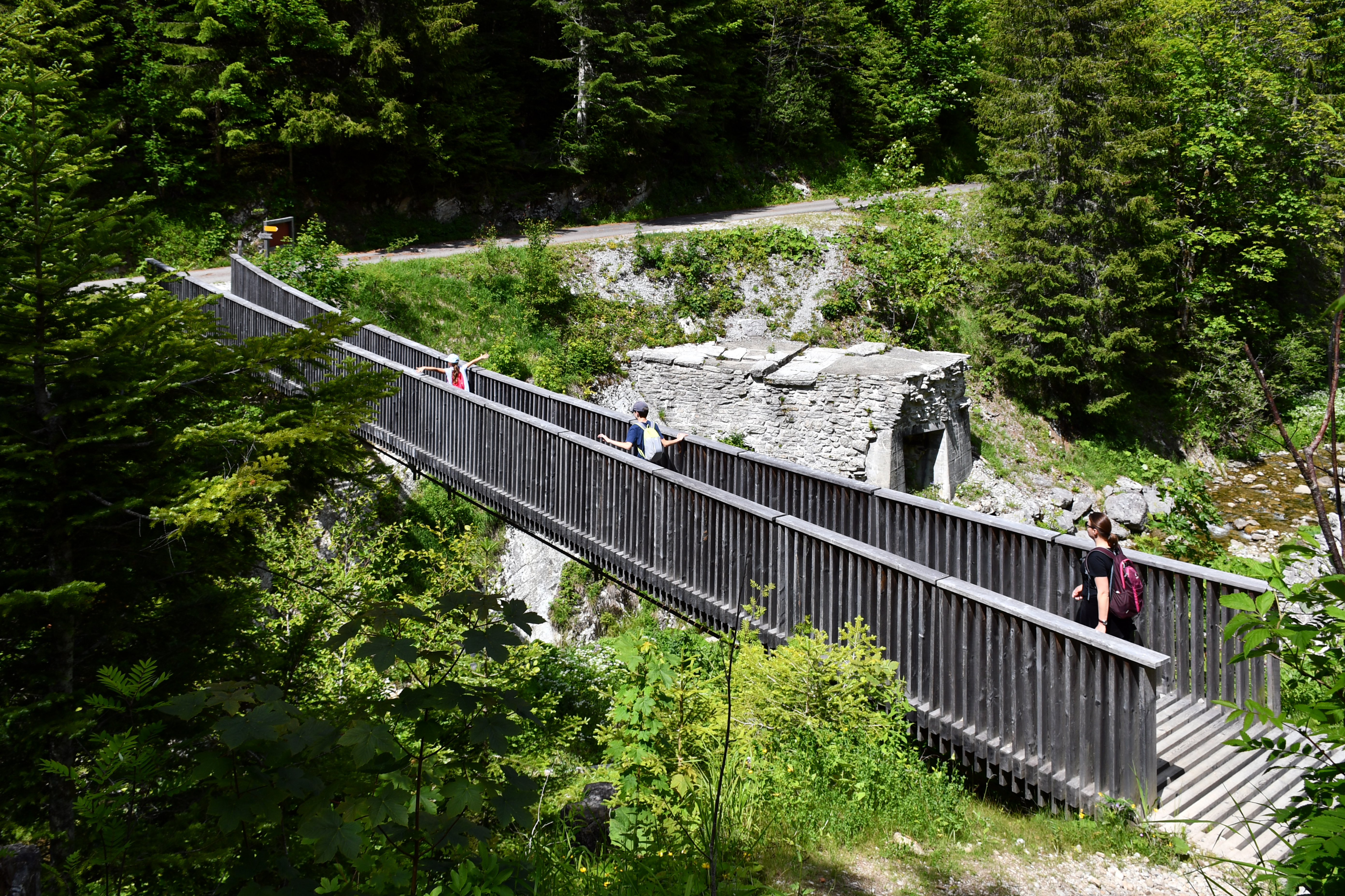 la passerelle de la Joux-Verte (construite en 2014) et, derrière lui, les ruines de l'ancien barrage-écluse de la Joux Verte, datant du XVIIe siècle, situé sur l'Eau Froide, rivière qui sépare les communes de Villeneuve (à gauche) et de Corbeyrier (à droite), dans le canton de Vaud, en Suisse.